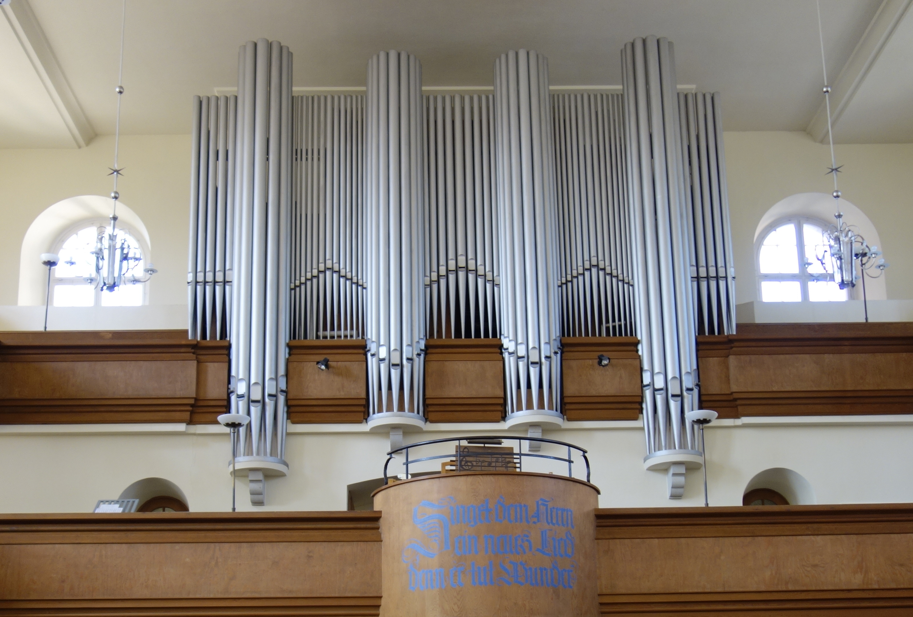 Kirche Seifhennersdorf August 2017 (11)